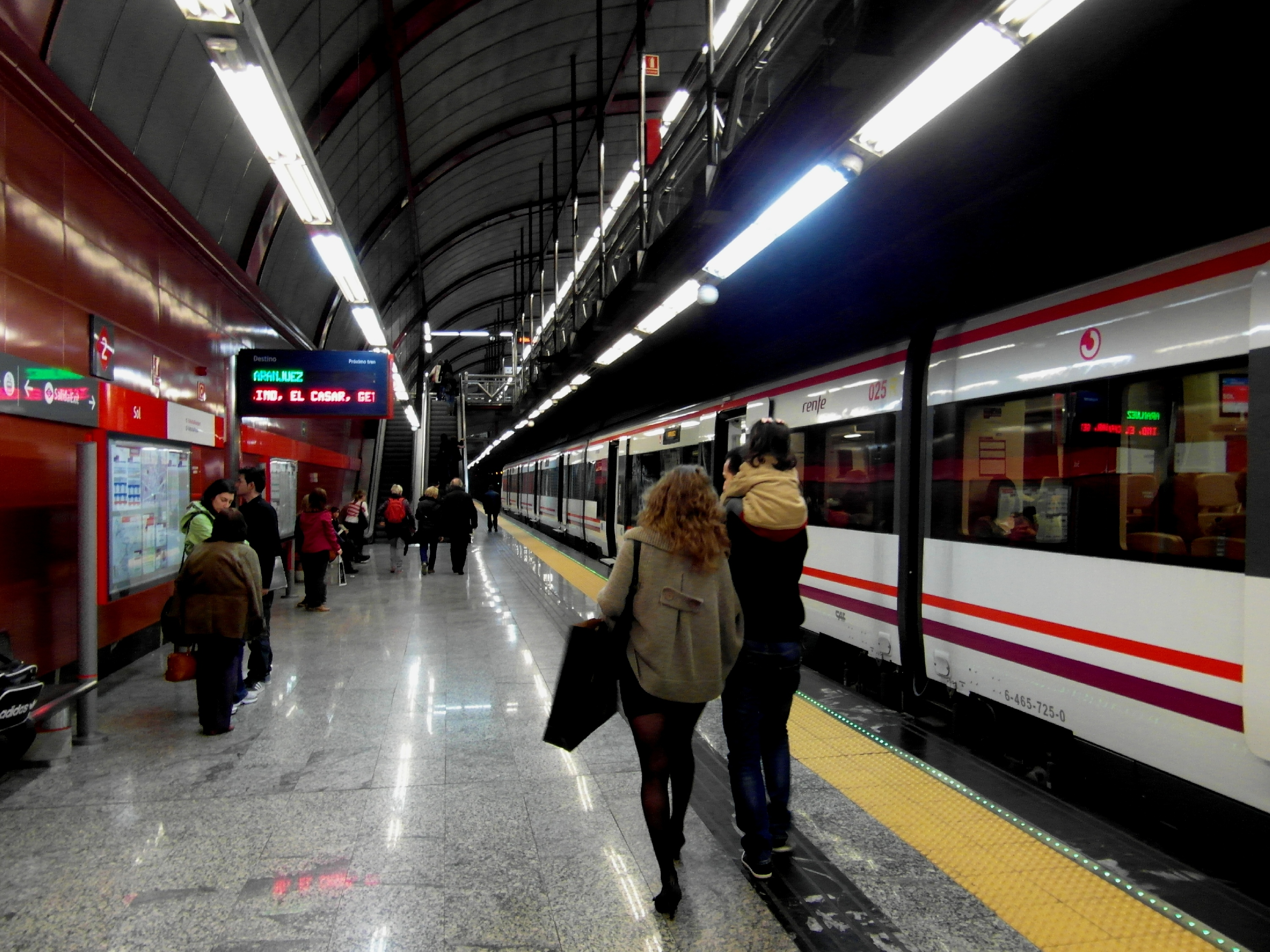 Estación de Sol, Cercanías Madrid.